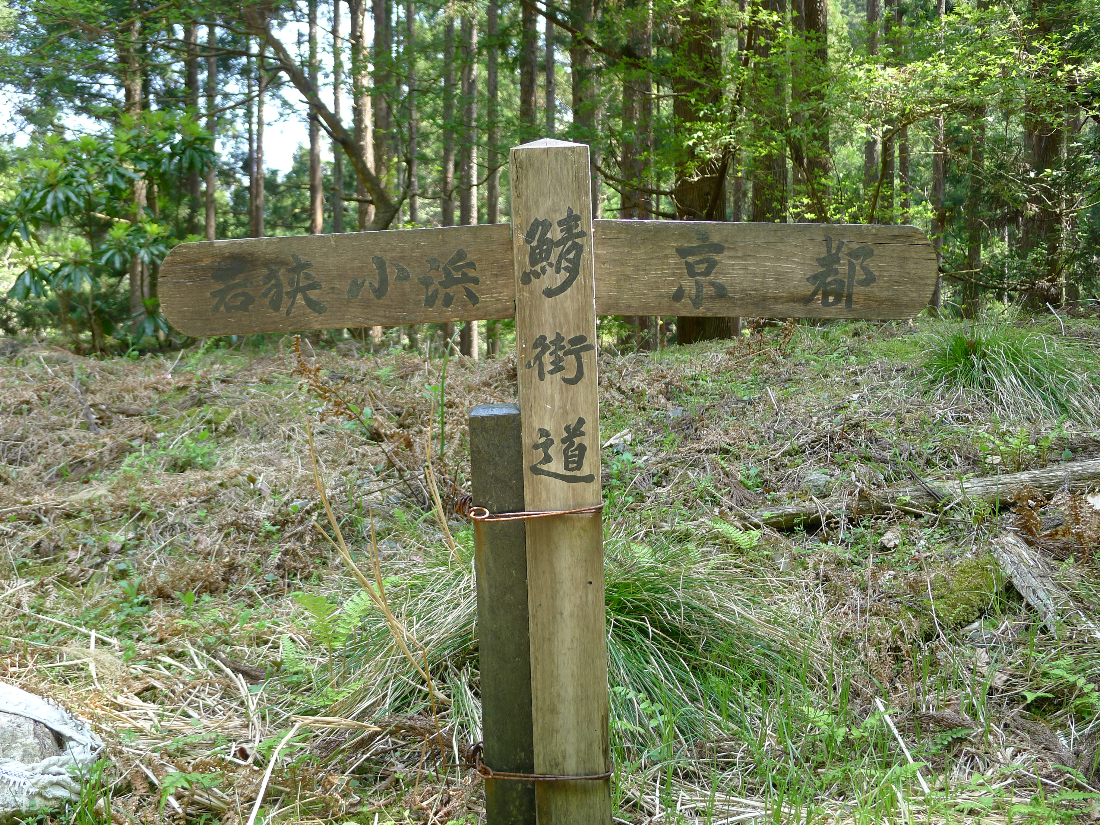 京都市左京区久多を通過する鯖街道の道標